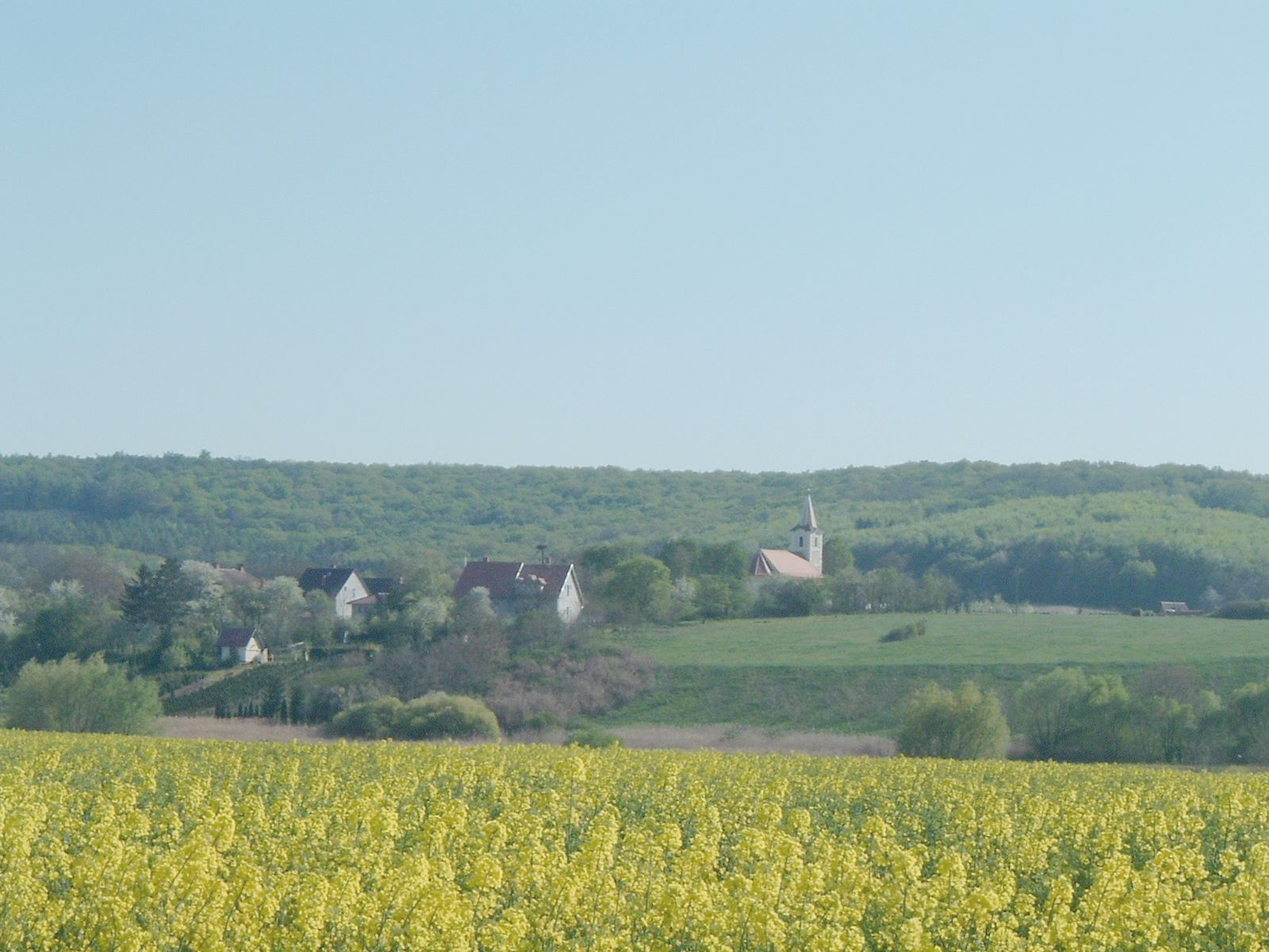 Dozmat, Hungary